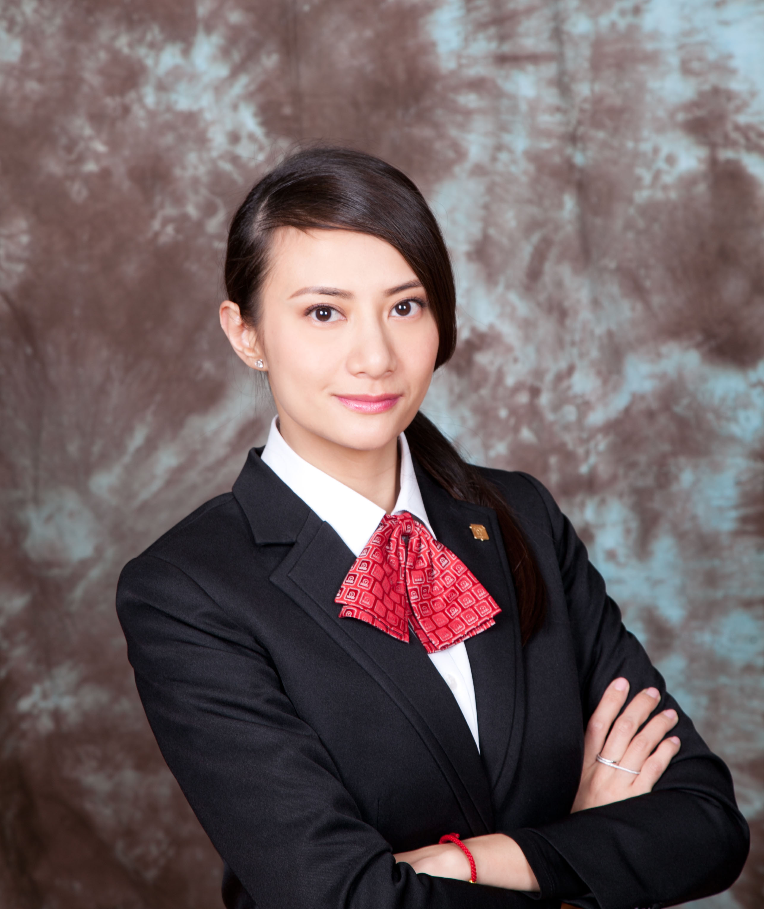 2015 emme wong